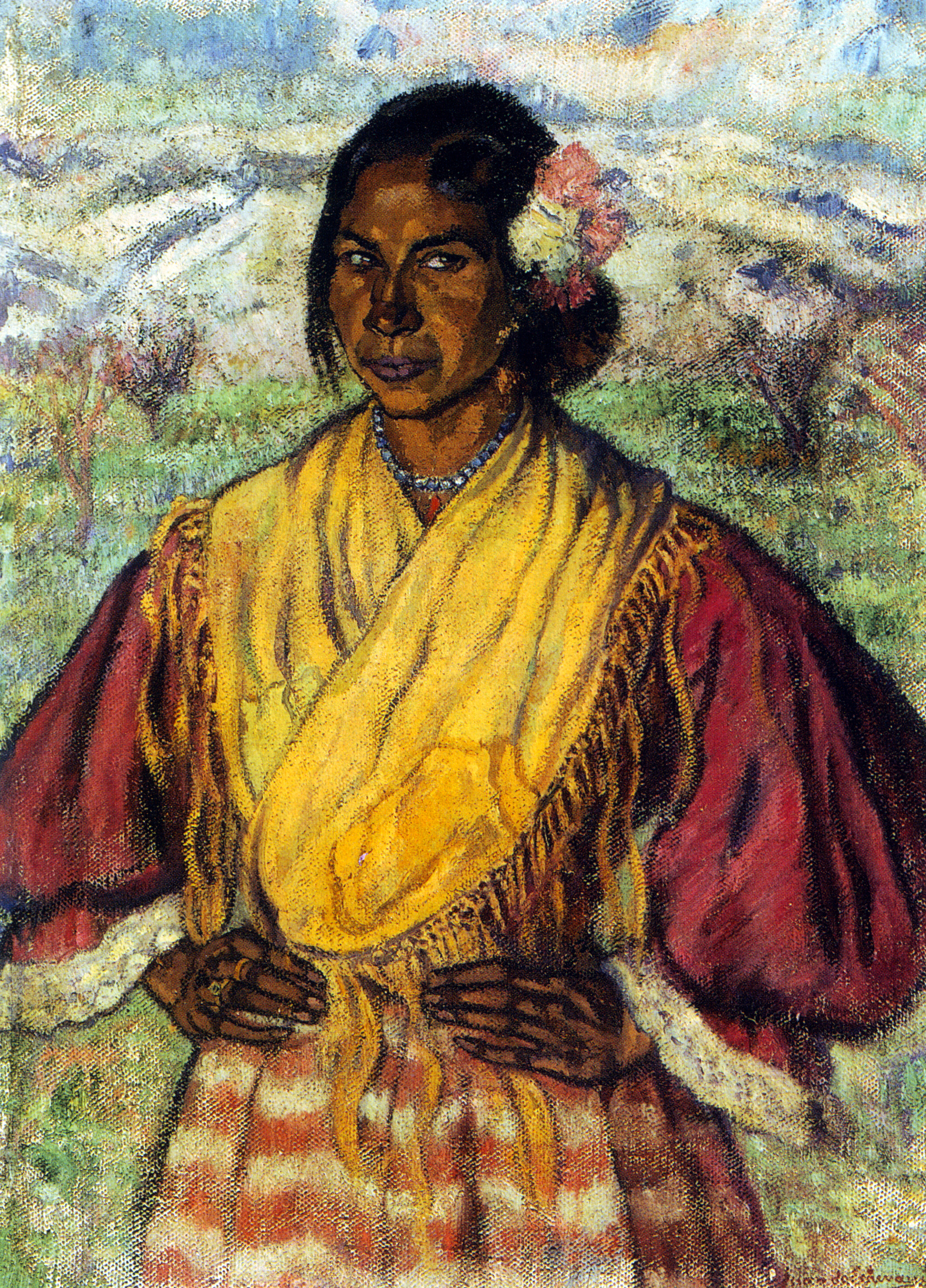 Gitana de Granada